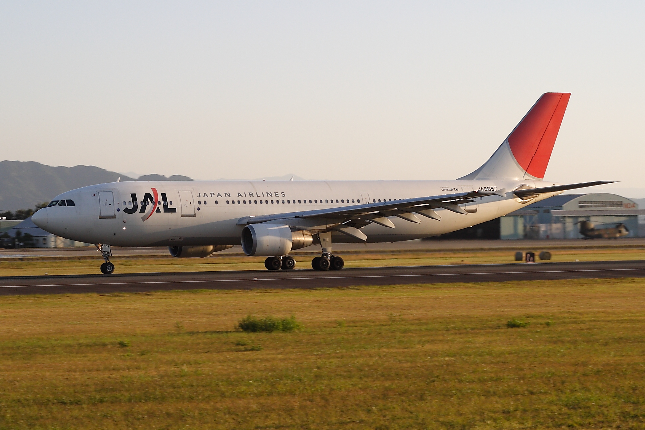 日本航空 エアバス A300-600R 熊本空港